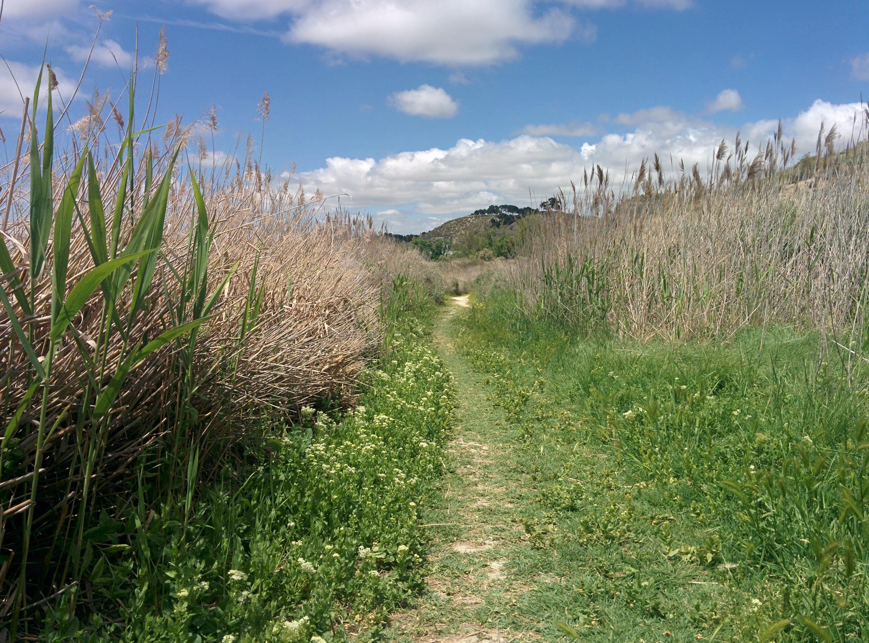 Mar de Ontígola. LIC Vegas, cuestas y páramos del sureste de Madrid. This is a photography of a Special Area of Conservation in Spain with the ID: ES3110006. Natura2000 entry, EEA entry